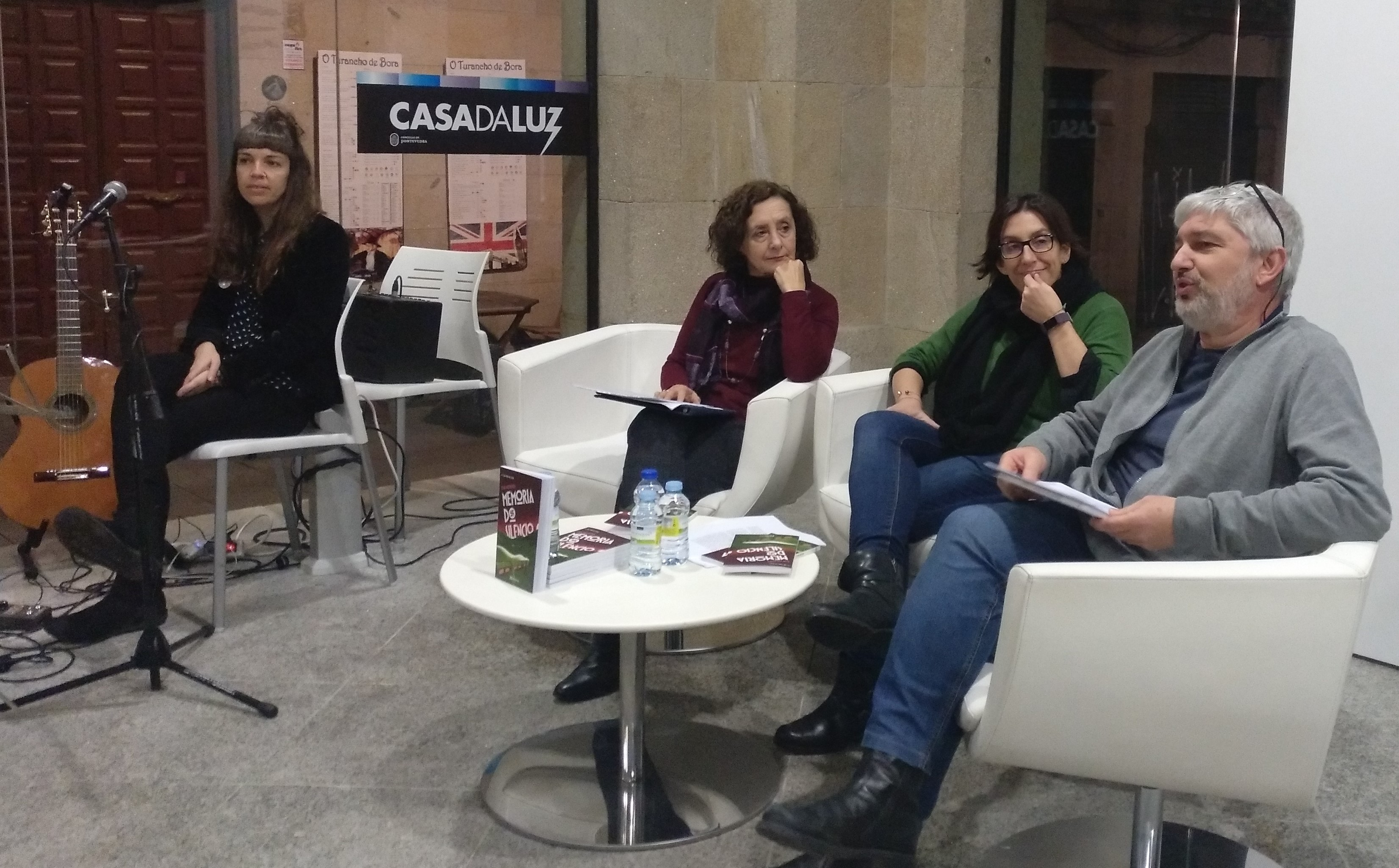 Presentación de "Memoria do silencio" de Eva Mejuto na Casa da Luz de Pontevedra nun acto organizado pola Libraría Paz o 29/01/19. De esquerda a dereita: Su Garrido Pombo, María Xesús López Escudeiro, Eva Mejuto e Fran Alonso